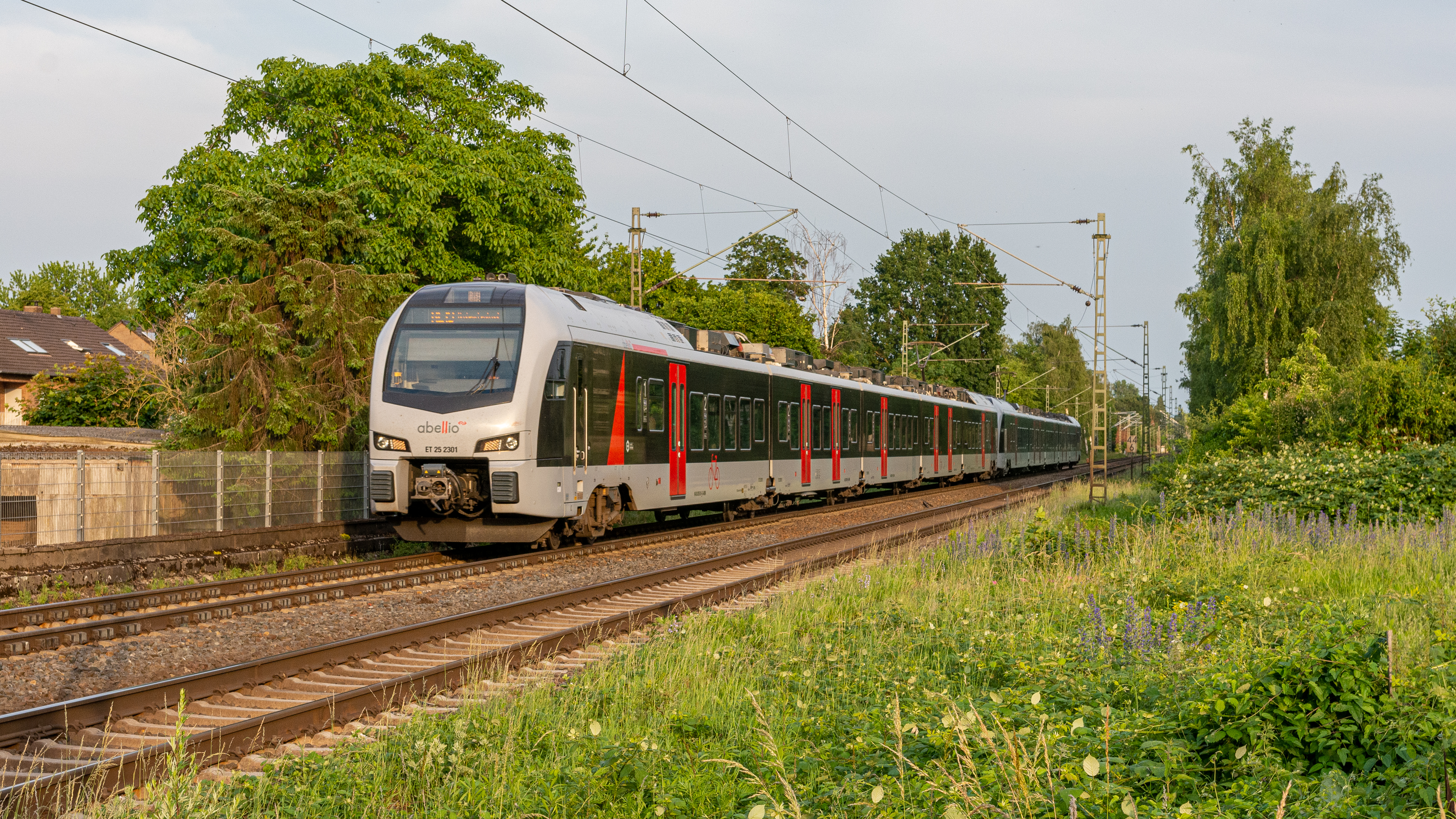 In de spits rijdt Abellio tussen Düsseldorf en Emmerich veelal met dubbele stellen. In Haldern komen tijdens de vrijdagavondspits Flirt ET 25 2301 en 25 2210, als RE19 richting Emmerich, binnen rijden. Het voorste treinstel zal doorgaan naar Arnhem, terwijl het achterste in Emmerich wordt afgekoppeld.